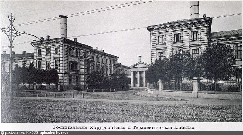 Госпитальные клиники на Девичьем поле (хирургическая и терапевтическая), открытые в 1891 году.